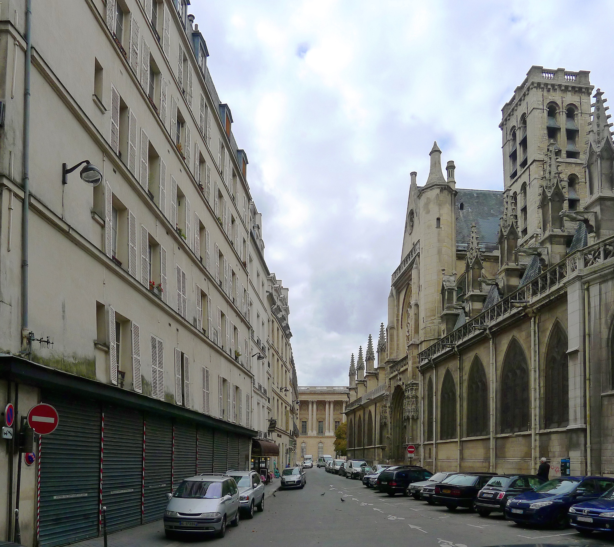 Rue des prêtres-Saint-Germain-l'Auxerrois - Paris Ier